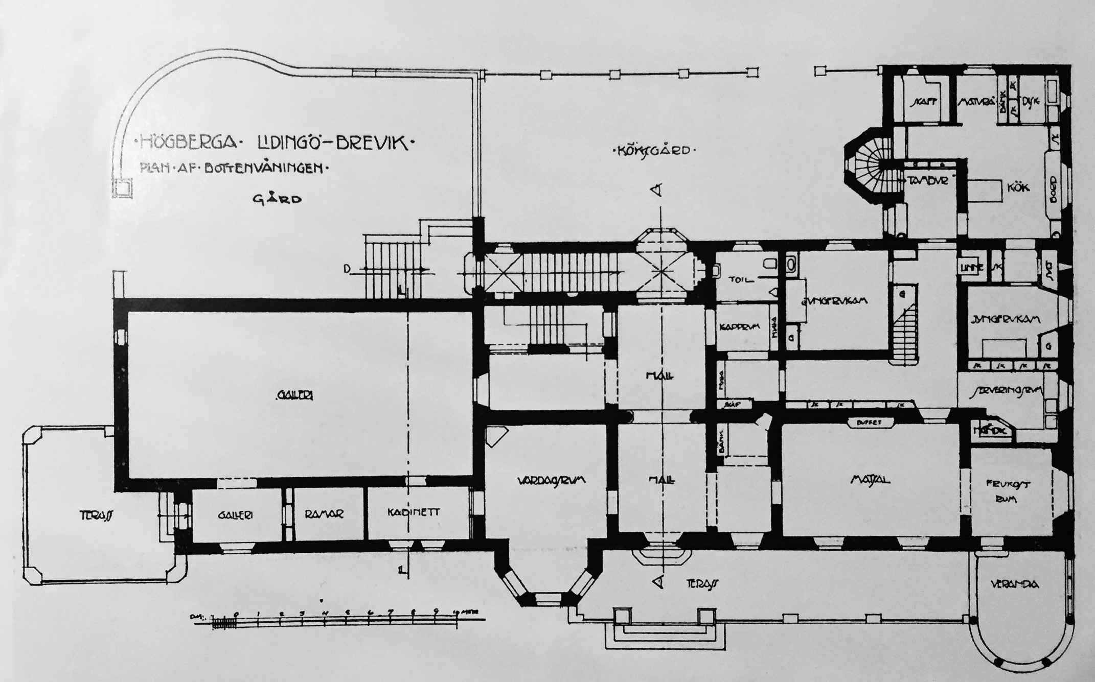 Villa Högberga, planer